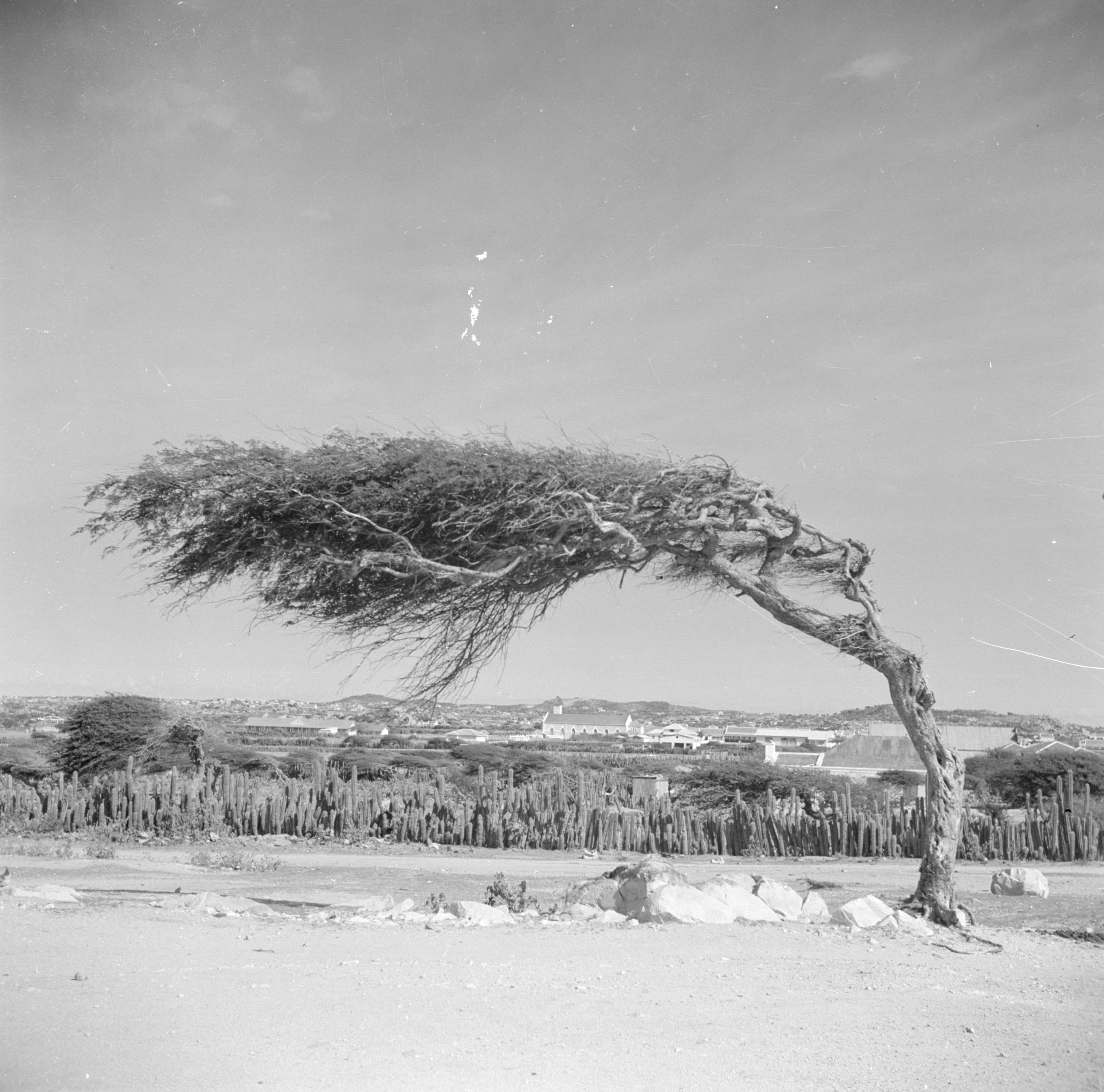 Collectie / Archief : Fotocollectie Van de Poll Reportage / Serie : Reis naar Suriname en de Nederlandse Antillen Beschrijving : Divi-diviboom op Aruba bij Santa Cruz Datum : 1947 Locatie : Aruba, Santa Cruz Trefwoorden : bomen, landschappen Fotograaf : Poll, Willem van de Auteursrechthebbende : Nationaal Archief Materiaalsoort : Negatief (zwart/wit) Nummer archiefinventaris : bekijk toegang 2.24.14.02 Bestanddeelnummer : 252-1673